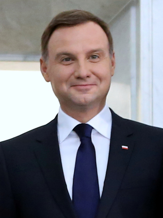 Andrzej Duda w gmachu Sejmu po zakończeniu obrad Zgromadzenia Narodowego zwołanego w celu odebrania przysięgi od nowo wybranego prezydenta